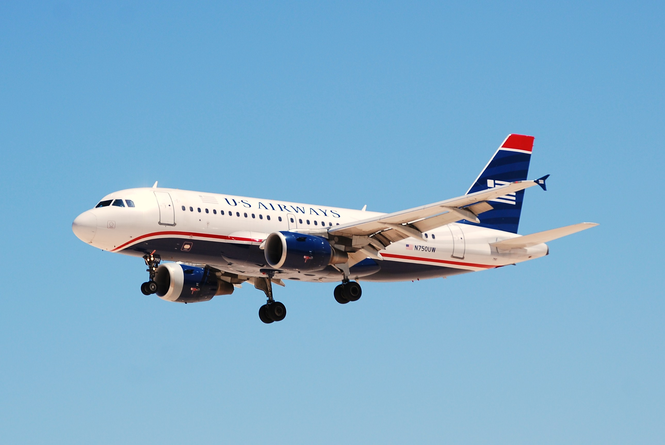 US AIRWAYS A319-112 N750UW